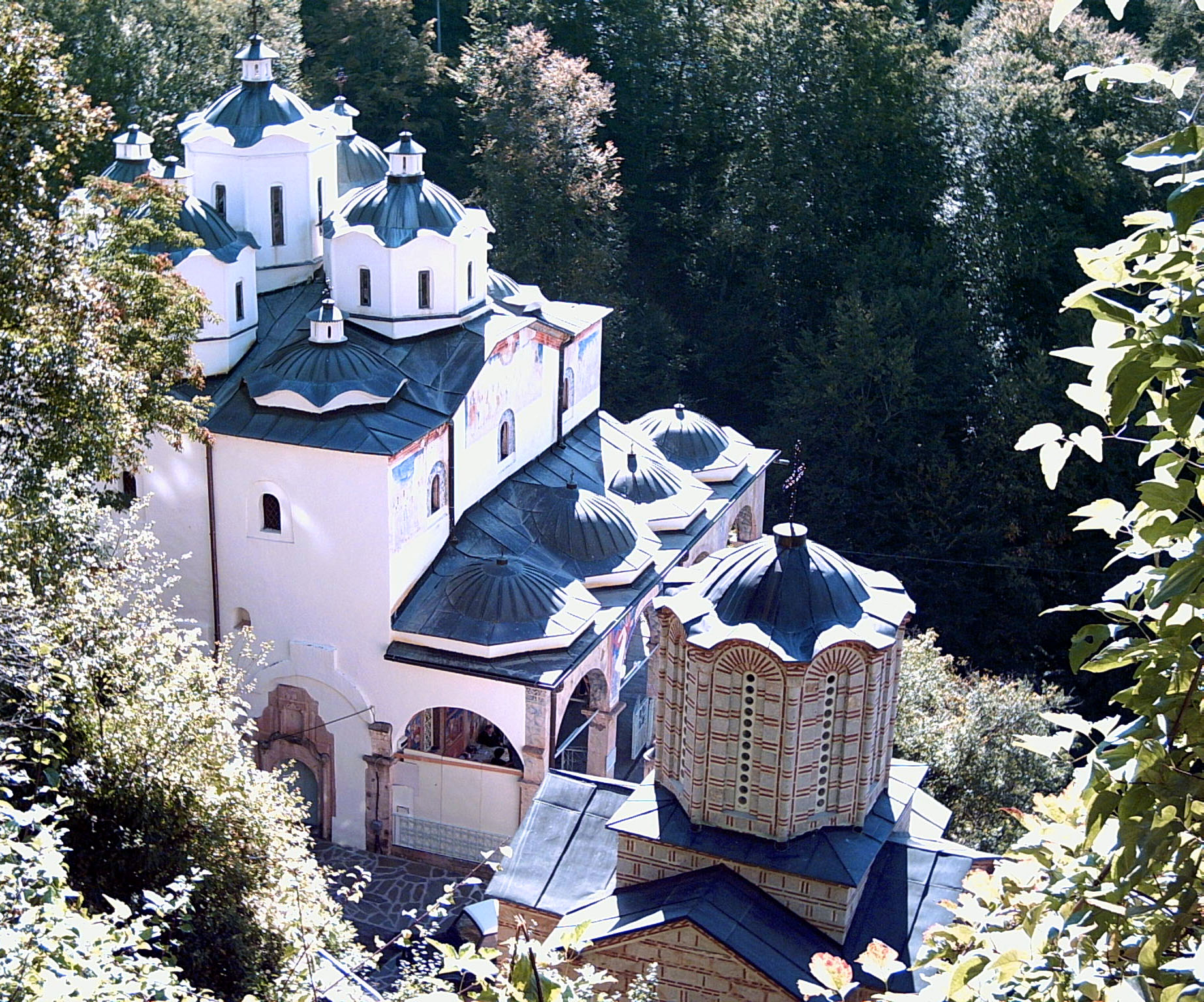 Monastery of Sveti Joakim Osogovski, near Kriva Palanka, Republic of Macedonia